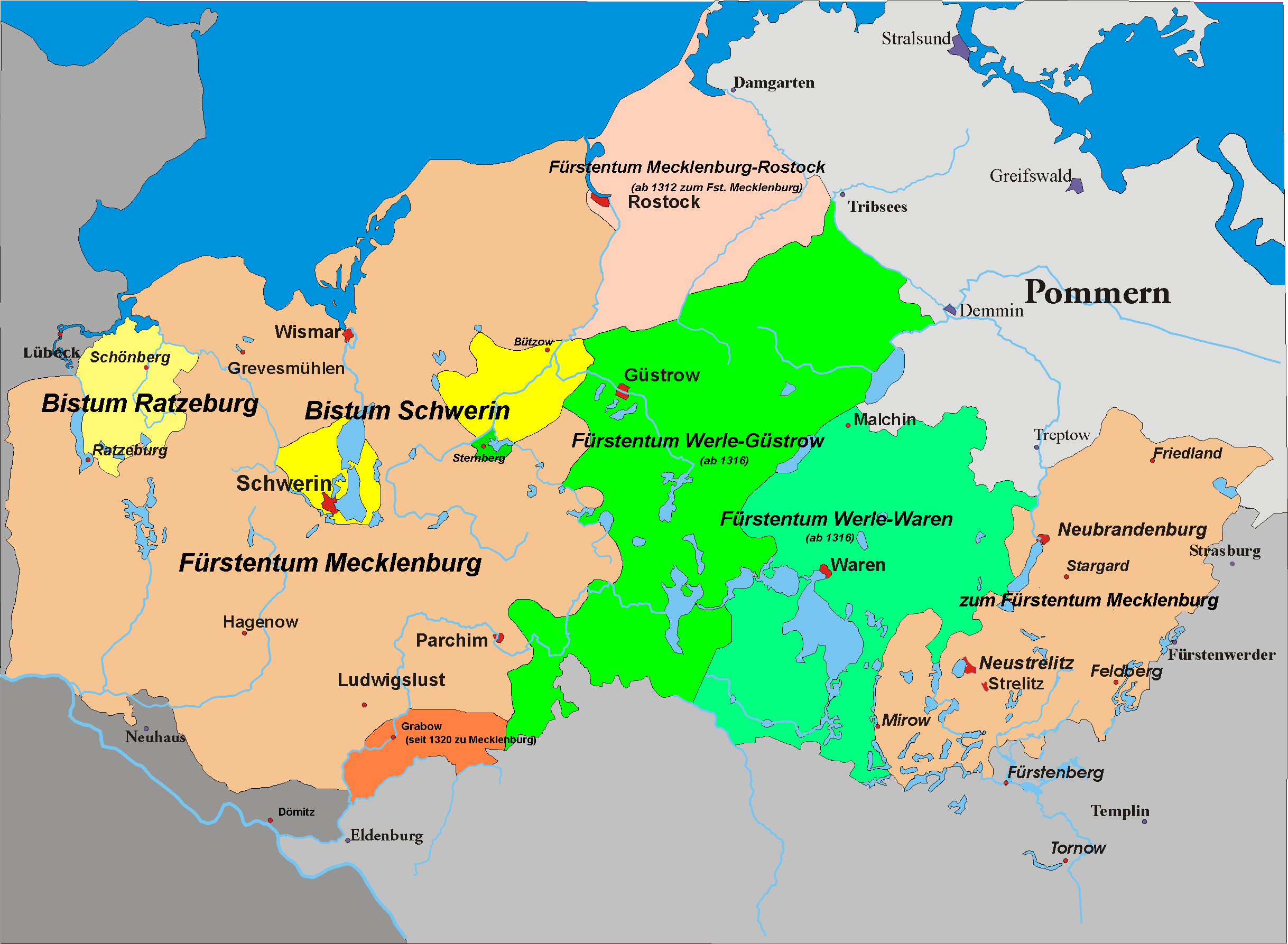 Karte von Mecklenburg-Werle um 1300